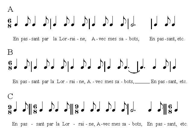 Description : Mesure Lorraine Source : Personnelle Licence : GFDL